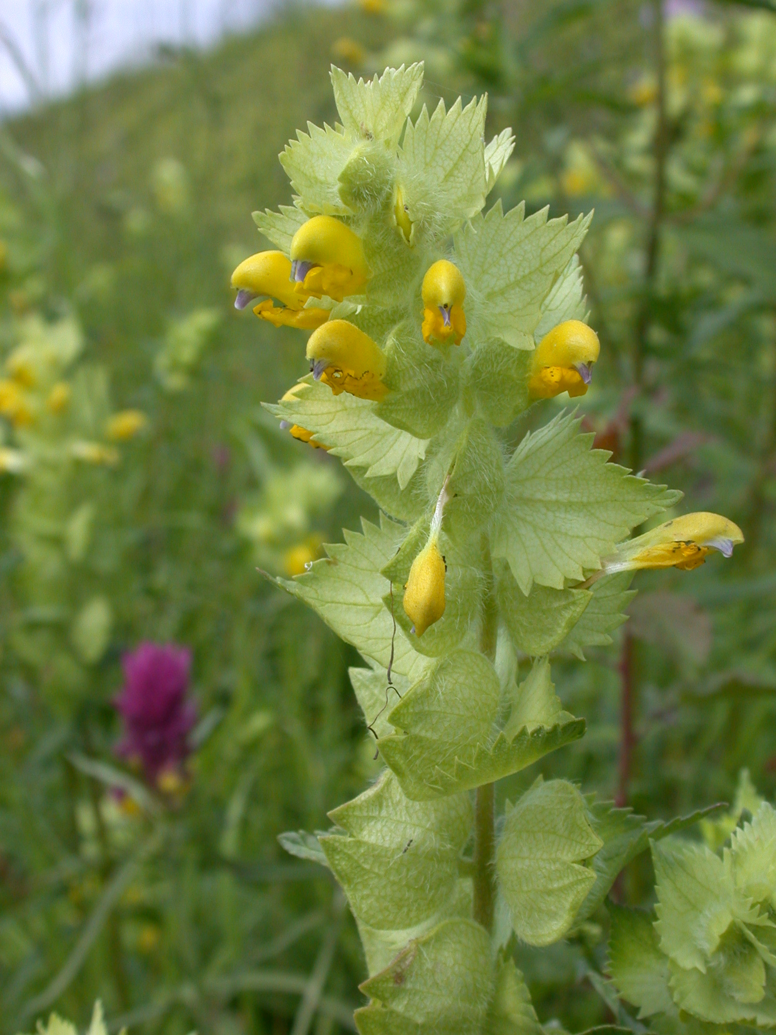 Rhinanthus alectorolophus-subsp-buccalis Route de Villotte-sur-Aire (Meuse), France